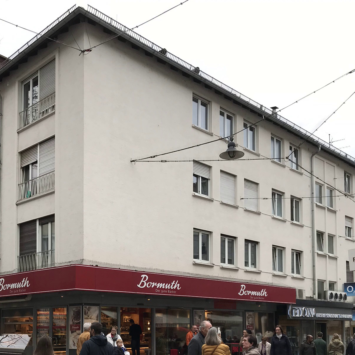 Das Haus Ernst-Ludwig-Straße 17 in Darmstadt, wo Barbara Hund, ihre Schwester Susanne, sowie ihre Mutter Juliane und ihr Vater Gerhard Hund (Mitarbeiter von Prof. Dr. Alwin Walther) bis 1961 wohnten.